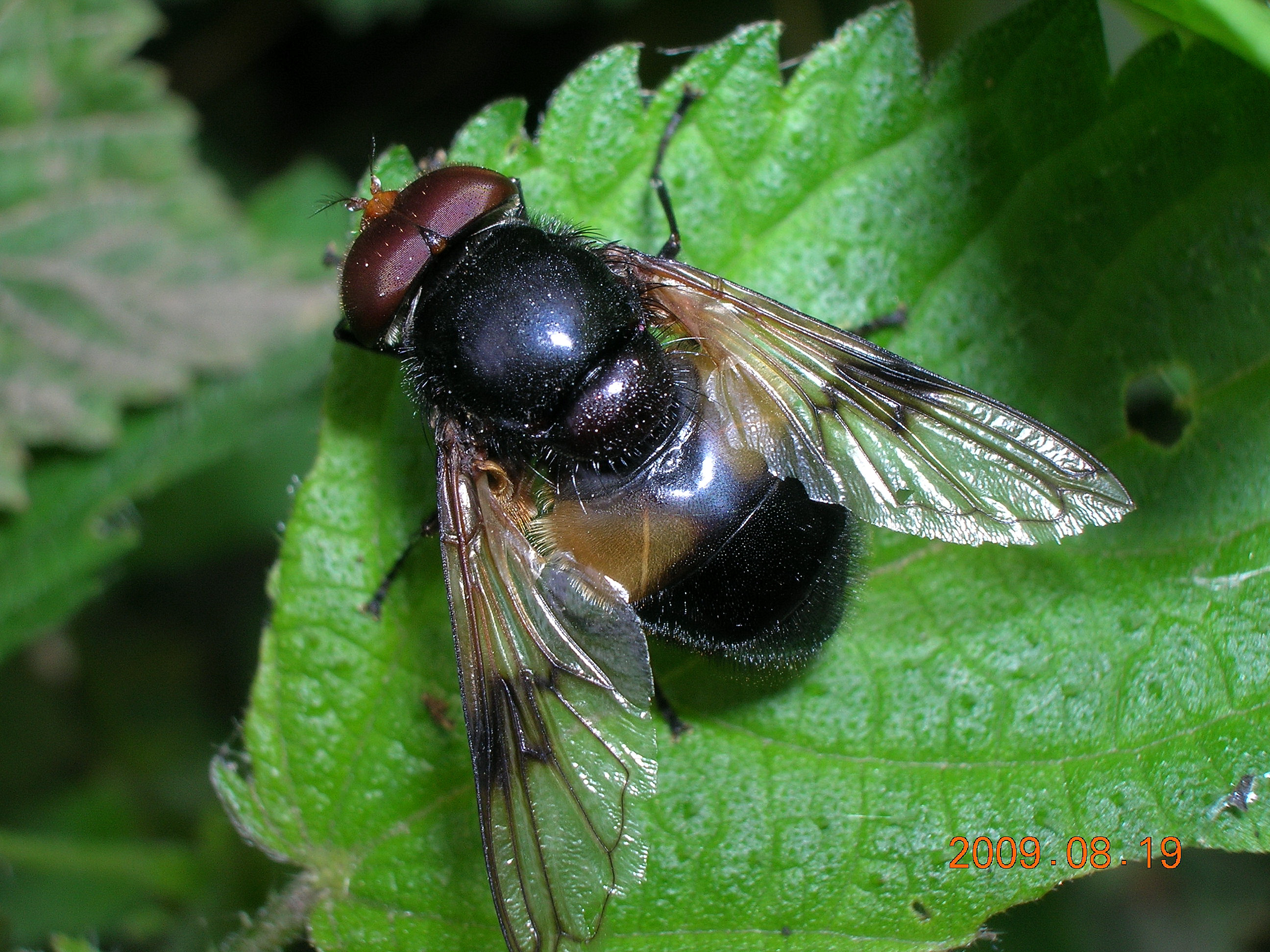 Trzmielówka leśna (Volucella pellucens) w stanie spoczynku, Polska